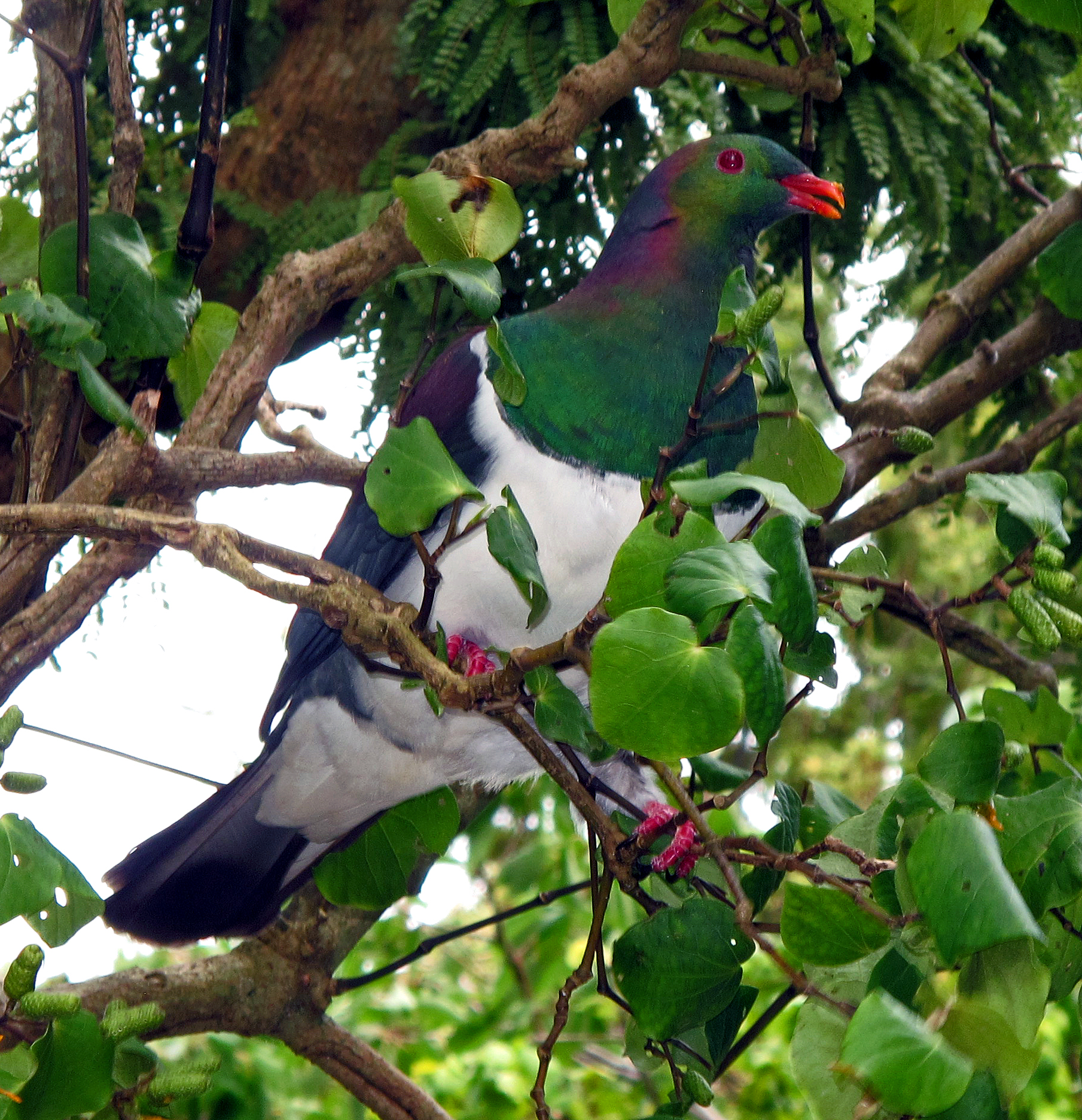 Kereru at Day's Bay